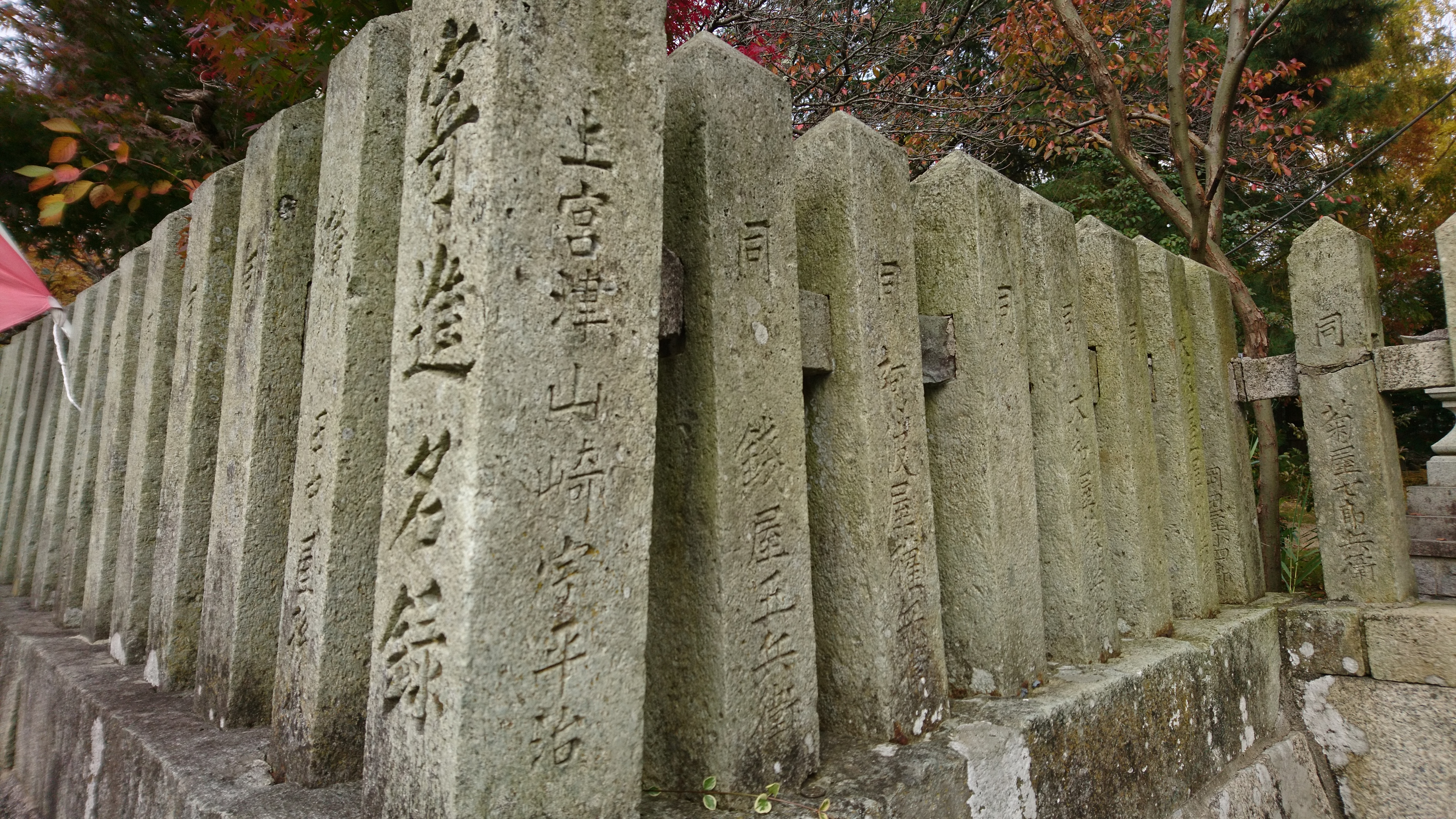 和貴宮神社の玉垣。寄進者に豪商・銭谷五兵衛らの名が刻まれている。